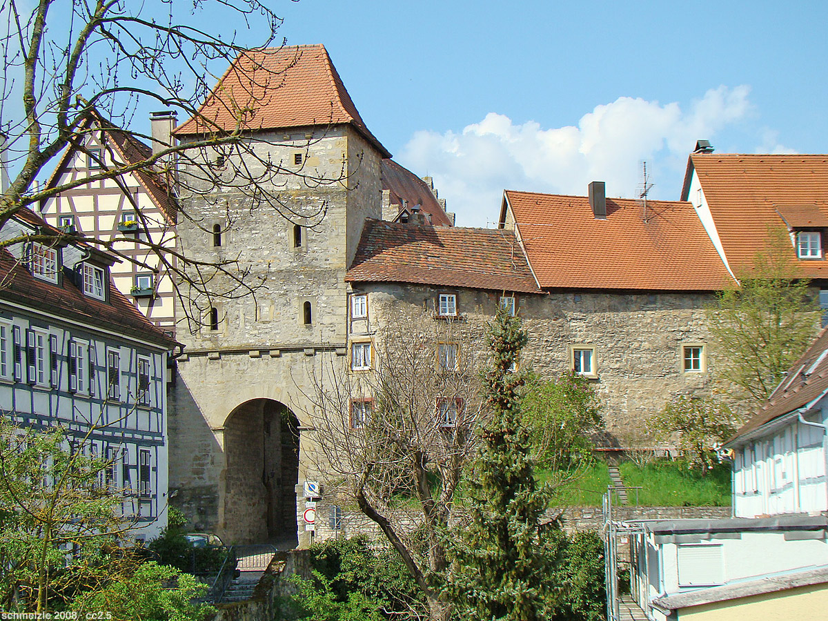 Bad Wimpfen, Burgviertel: Schwibbogentor, Zugangstor der Pfalz Wimpfen, rechts anschließend (in die Wohnbebauung aufgegangene) Reste der Wehrmauer